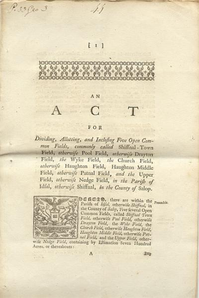 Un acte d'enclosure Enclosure Act for Shifnal, 1793 However the cost of obtaining an act of Parliament was expensive and some enclosure was undertaken by private agreement of the land-owners and occupiers especially after the passing of the General Enclosure Act of 1801 and the Enclosure by Consent Act of 1836.